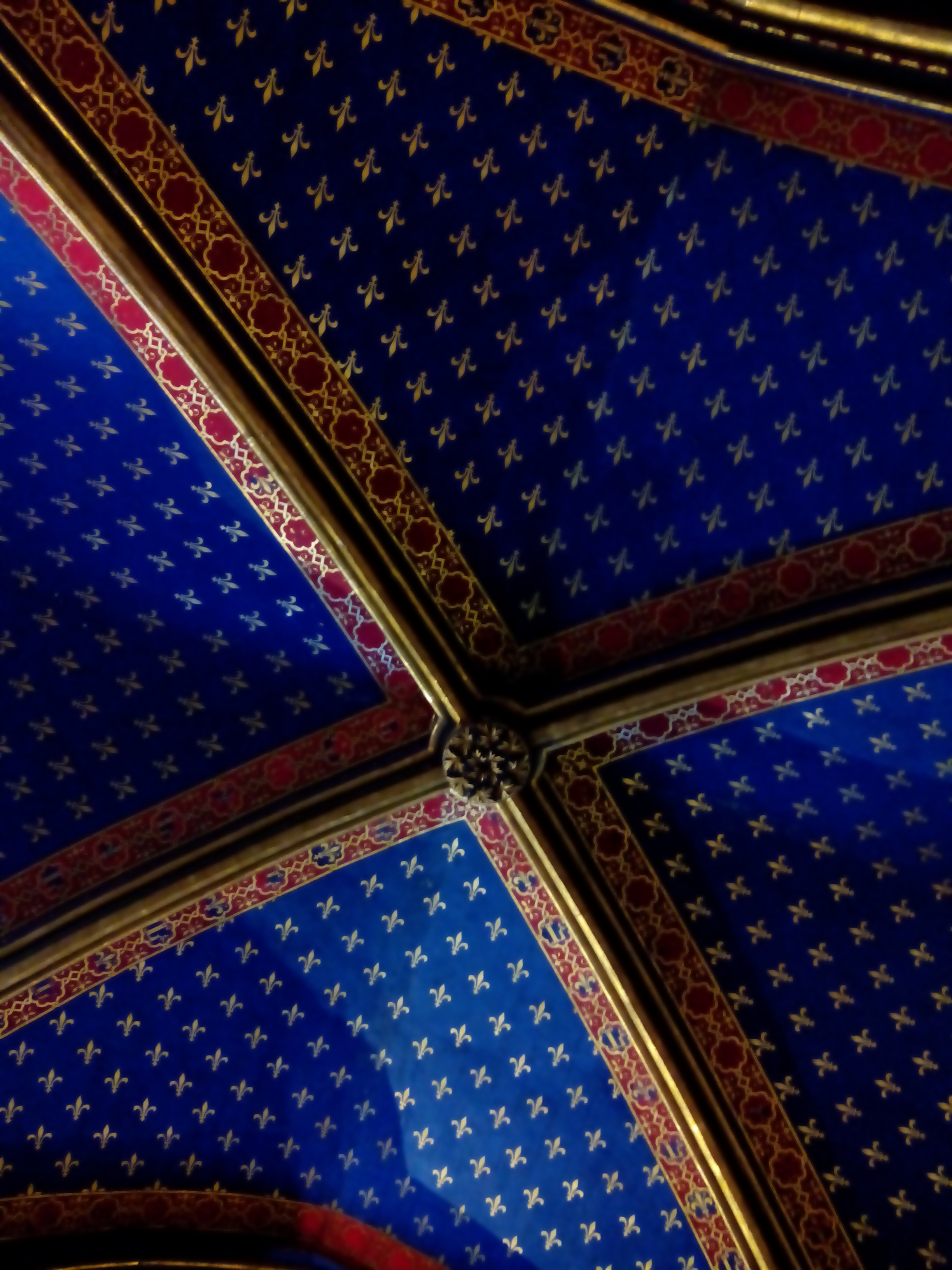 Saint Chapelle, agosto de 2014